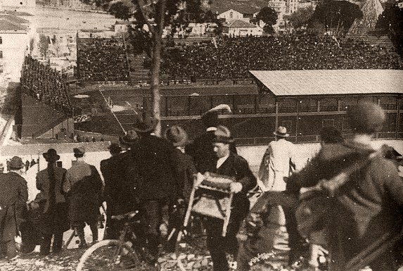 Il Campo Testaccio, mitico stadio della Associazione Sportiva Roma durante gli anni 30.